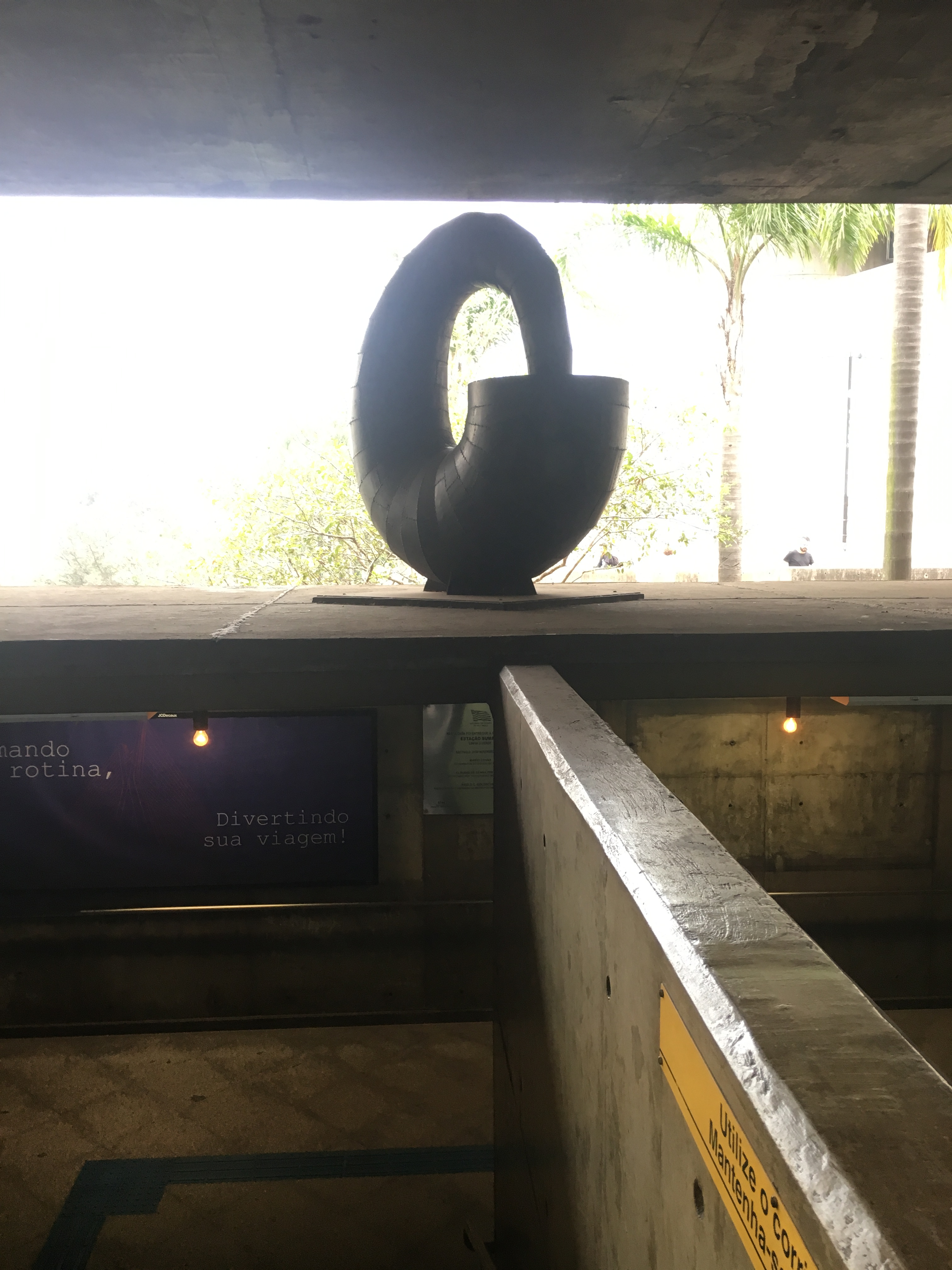 "Sem título" por Caíto, 1952. (chapas planas de aço corten, calandradas e soldadas. Diâmetro: 200cm x 160cm x 80cm)